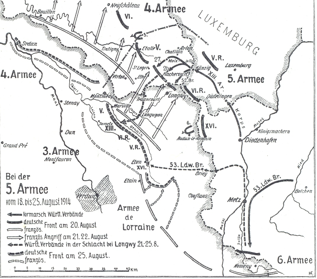 Karte Seite 20: 5. Armee August 1914